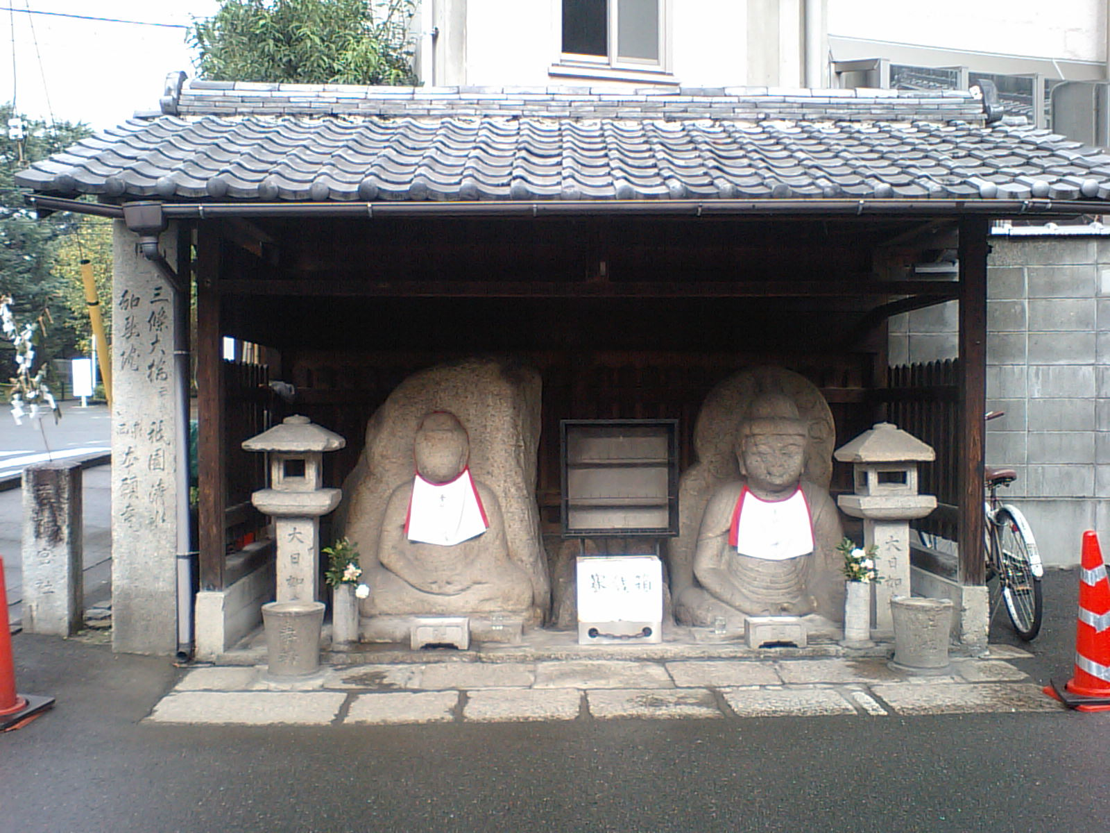 京都市左京区、北白川口の二王(ふたつおう)なる石仏。文化的には北白川との関わりが深いが現在は「吉田」、すなわち吉田神社の北口、鳥居前にある。